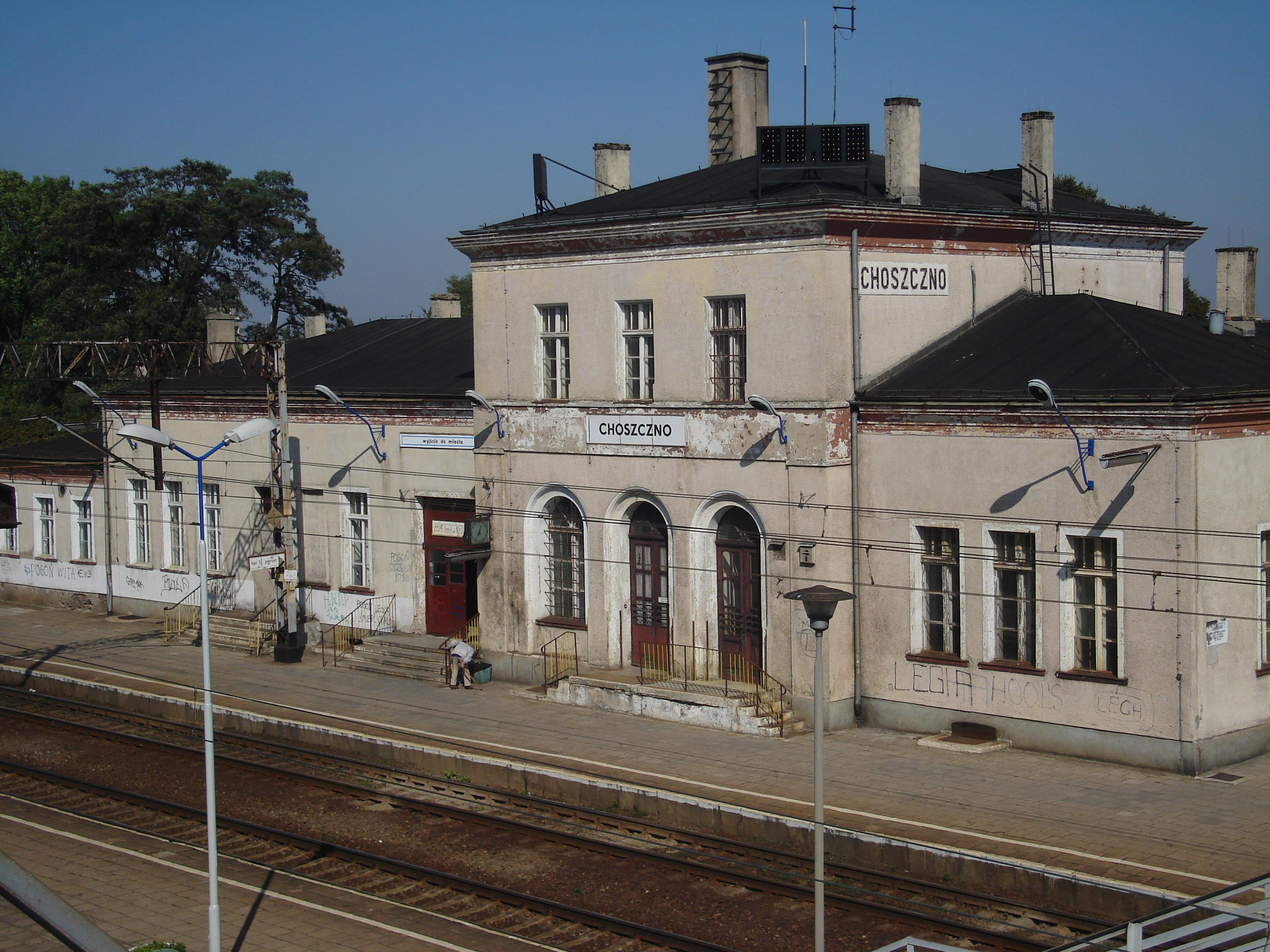 Choszczno - budynek dworca kolejowego